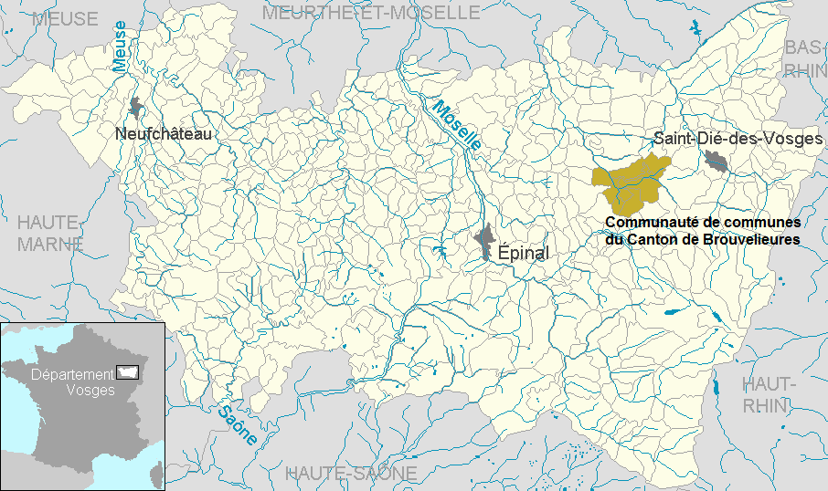 Communauté de communes du Canton de Brouvelieures dans le département des Vosges, Lorraine, France